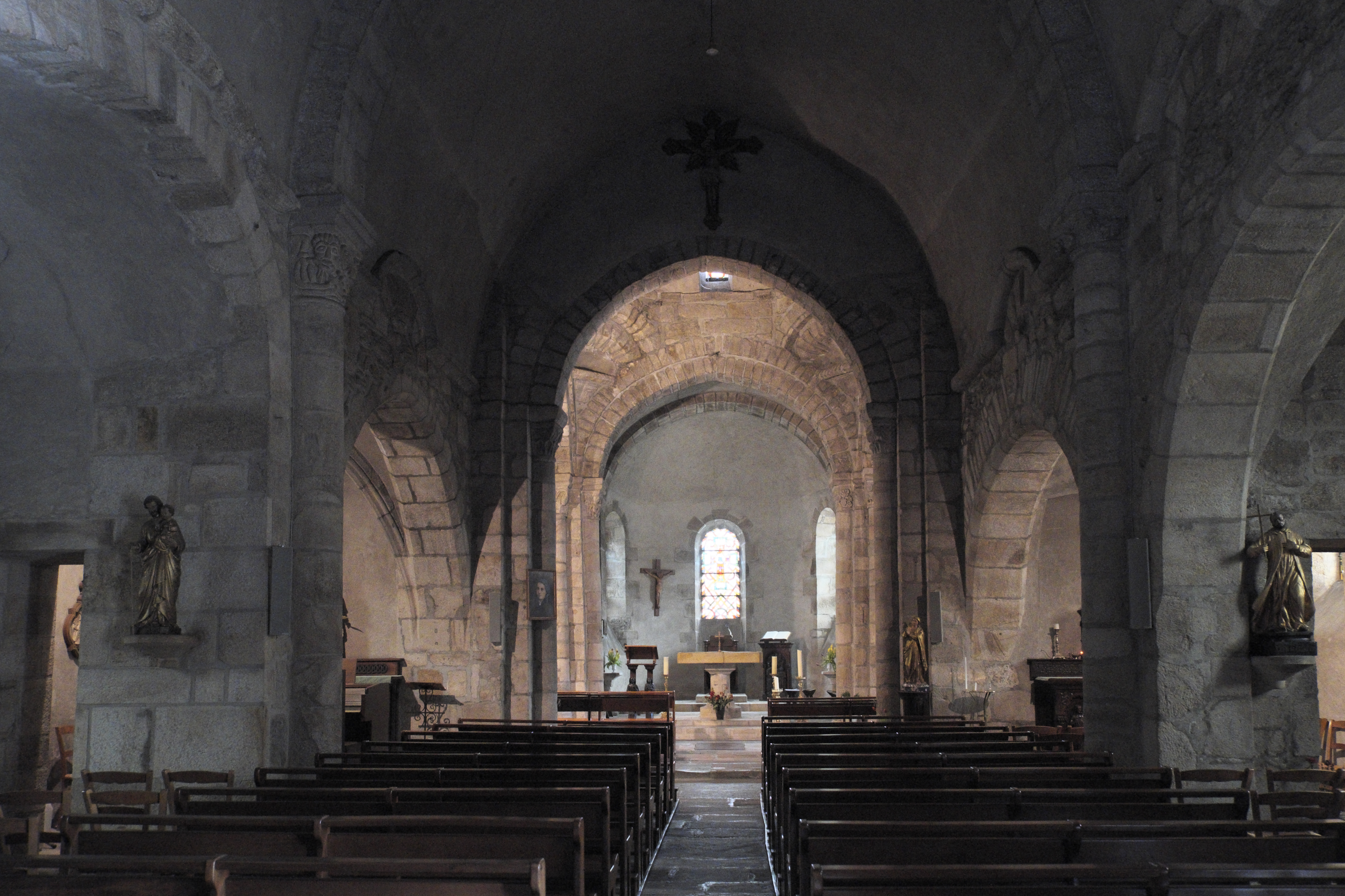 Katholische Kirche Saint-Fargheon in Bourg-Lastic im Département Puy-de-Dôme (Auvergne-Rhône-Alpes/Frankreich), Innenraum